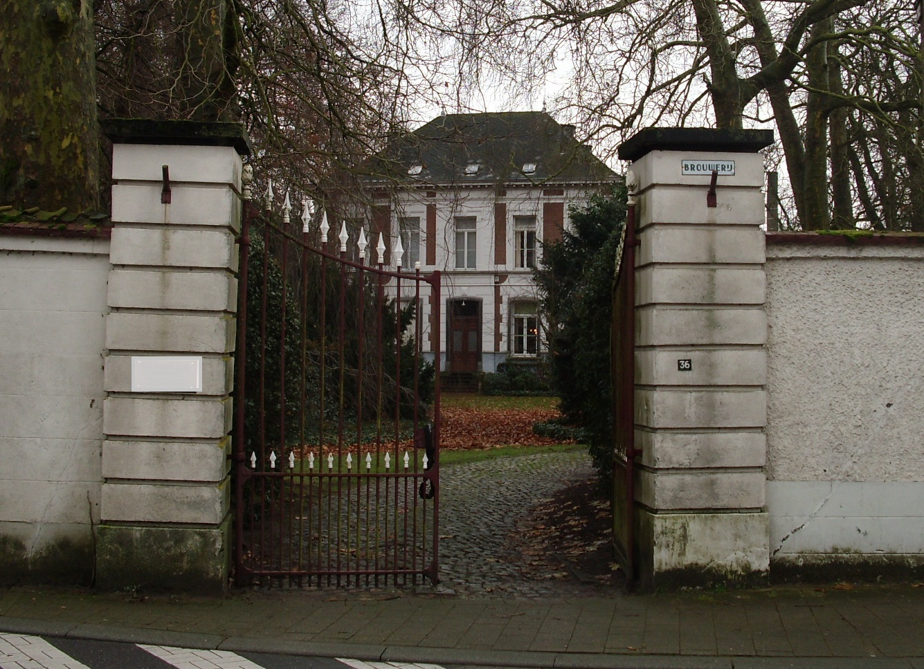 Woning brouwerij Walrave - Lepelstraat 36 - Laarne - Oost-Vlaanderen - Vlaanderen - België